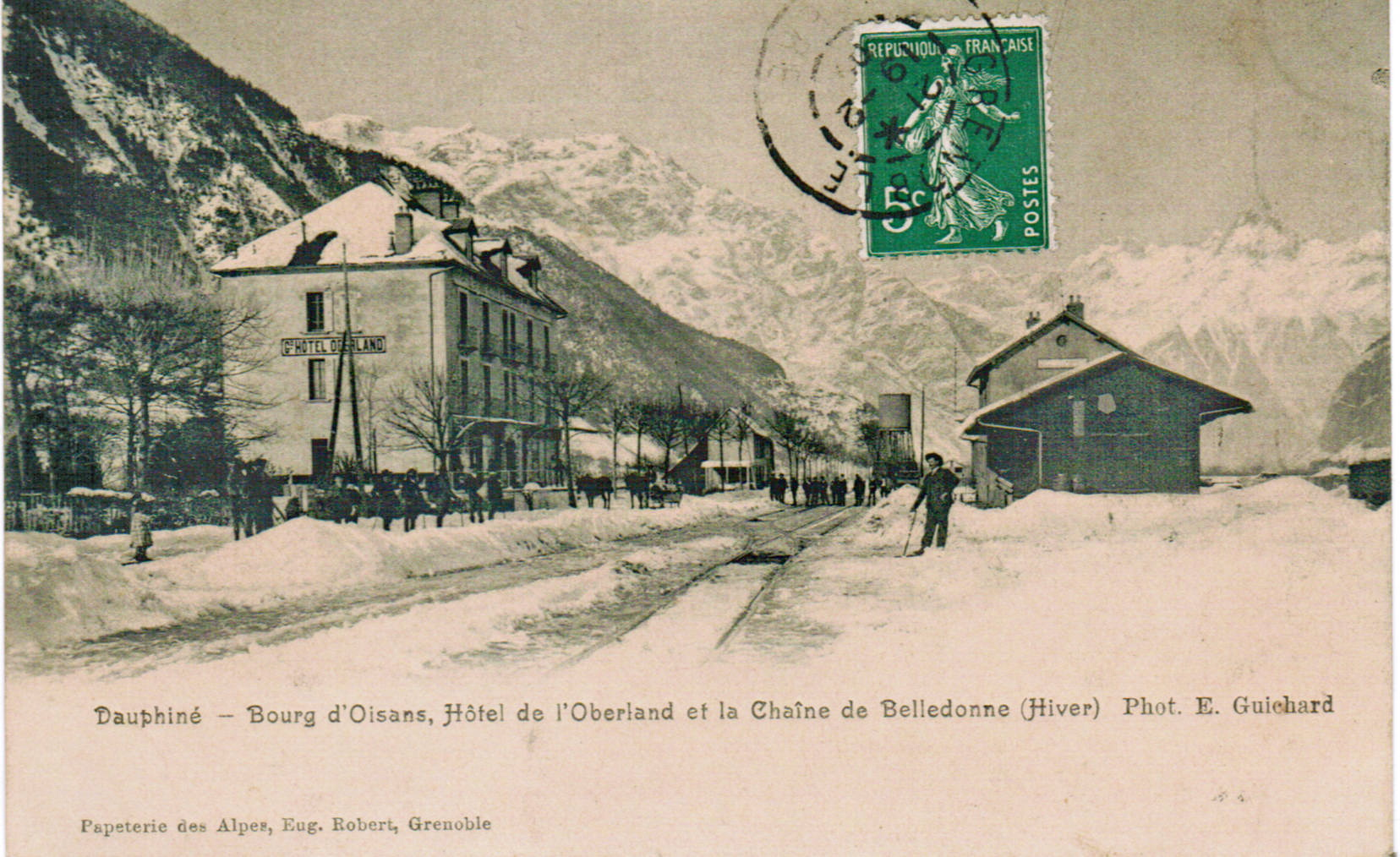 Carte postale ancienne éditée par la Papèterie des Alpes à Grenoble, cliché E. Guichard Dauphiné - BOURG-D'OISANS - Hôtel de l'Oberland et la chaîne de Belledonne (Hivers) A droite du cliché, installations ferroviaires terminales des Voies ferrées du Dauphiné, avec la voie métrique, la halle à marchandises et le pignon du bâtiment voyageurs, le château d'eau